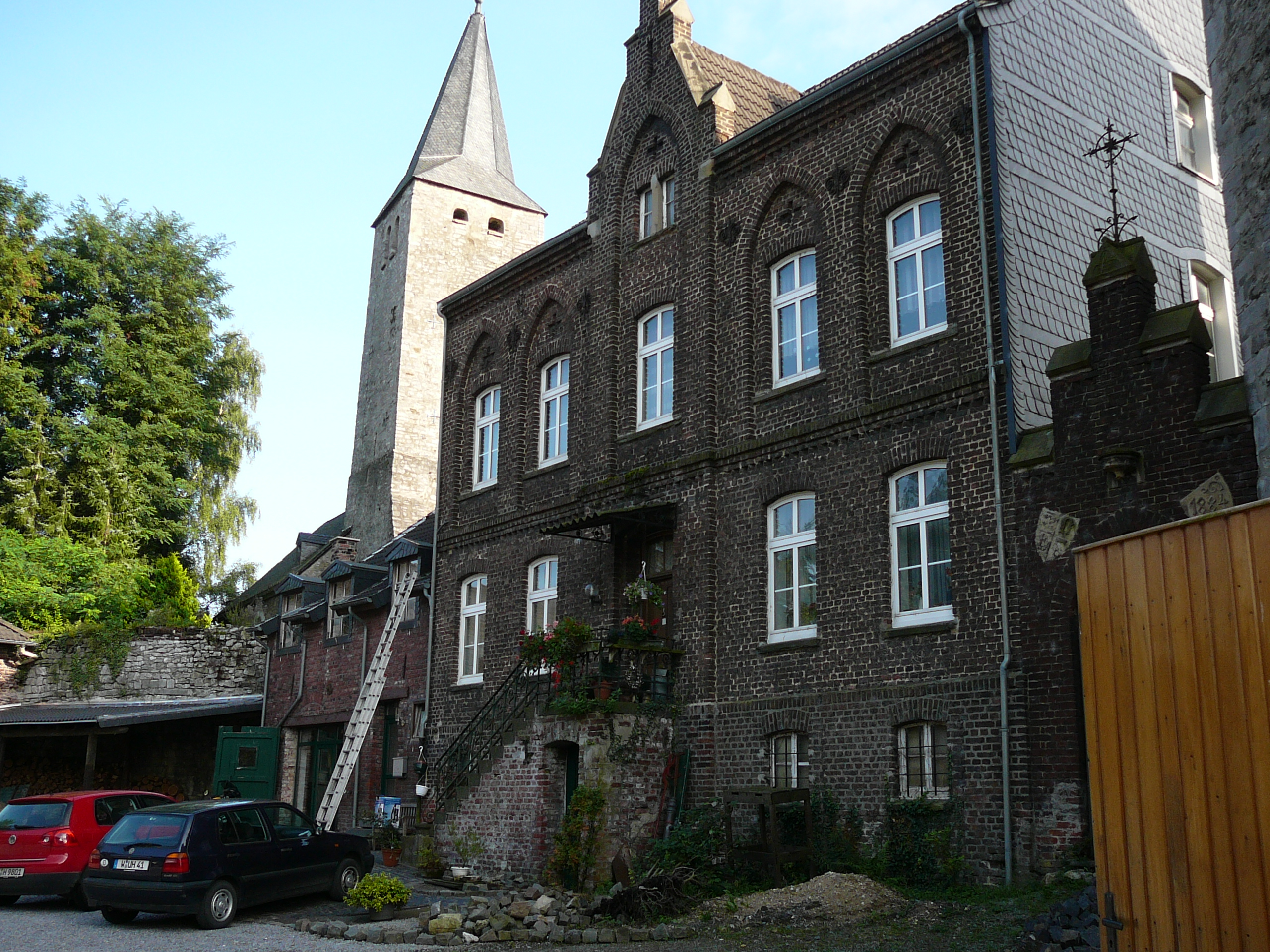 Zur Düssel, Wuppertal